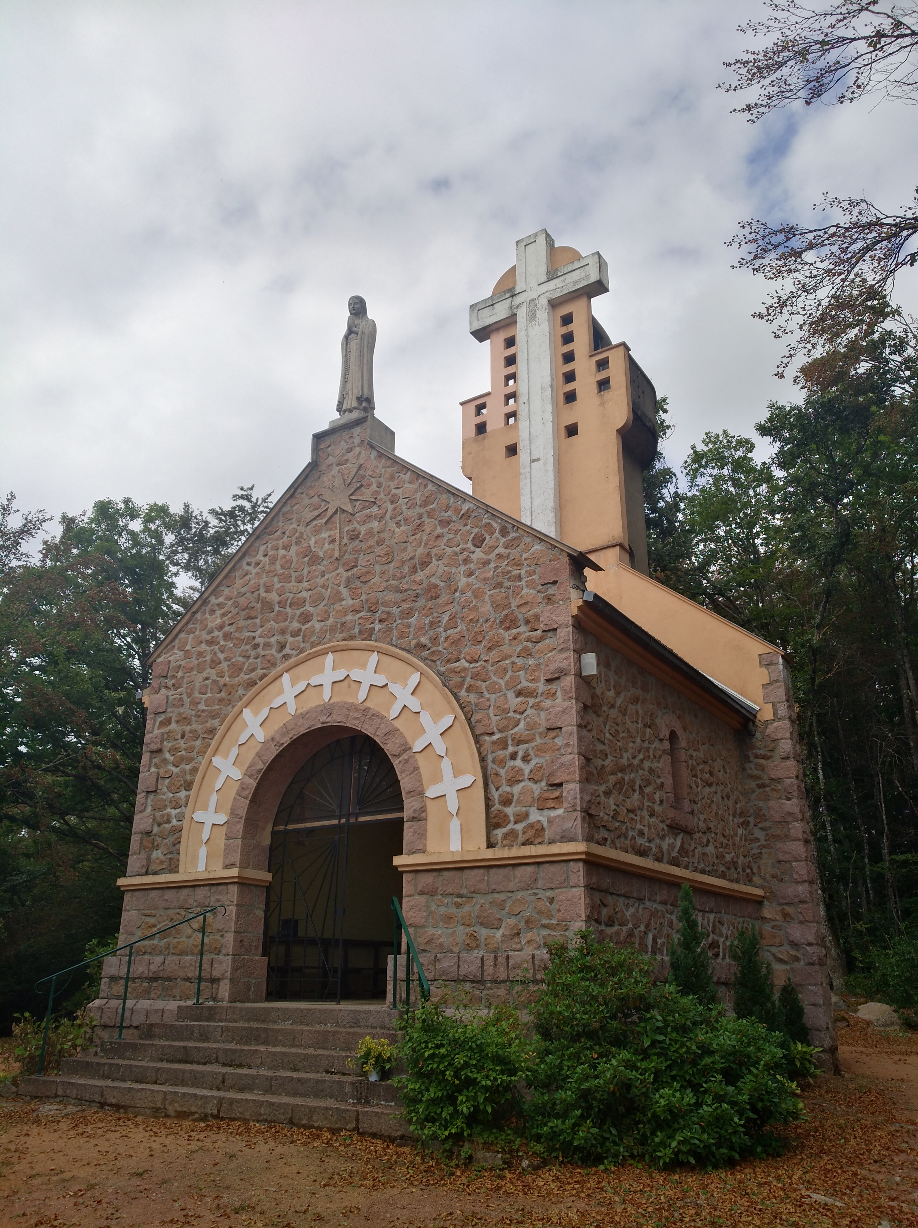 Chapelle Notre-Dame-de-Fatima du Cergne, dans le département de la Loire.